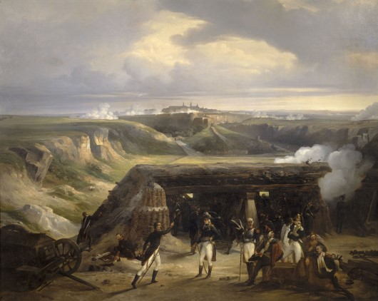 Siège de Luxembourg 1794-1795